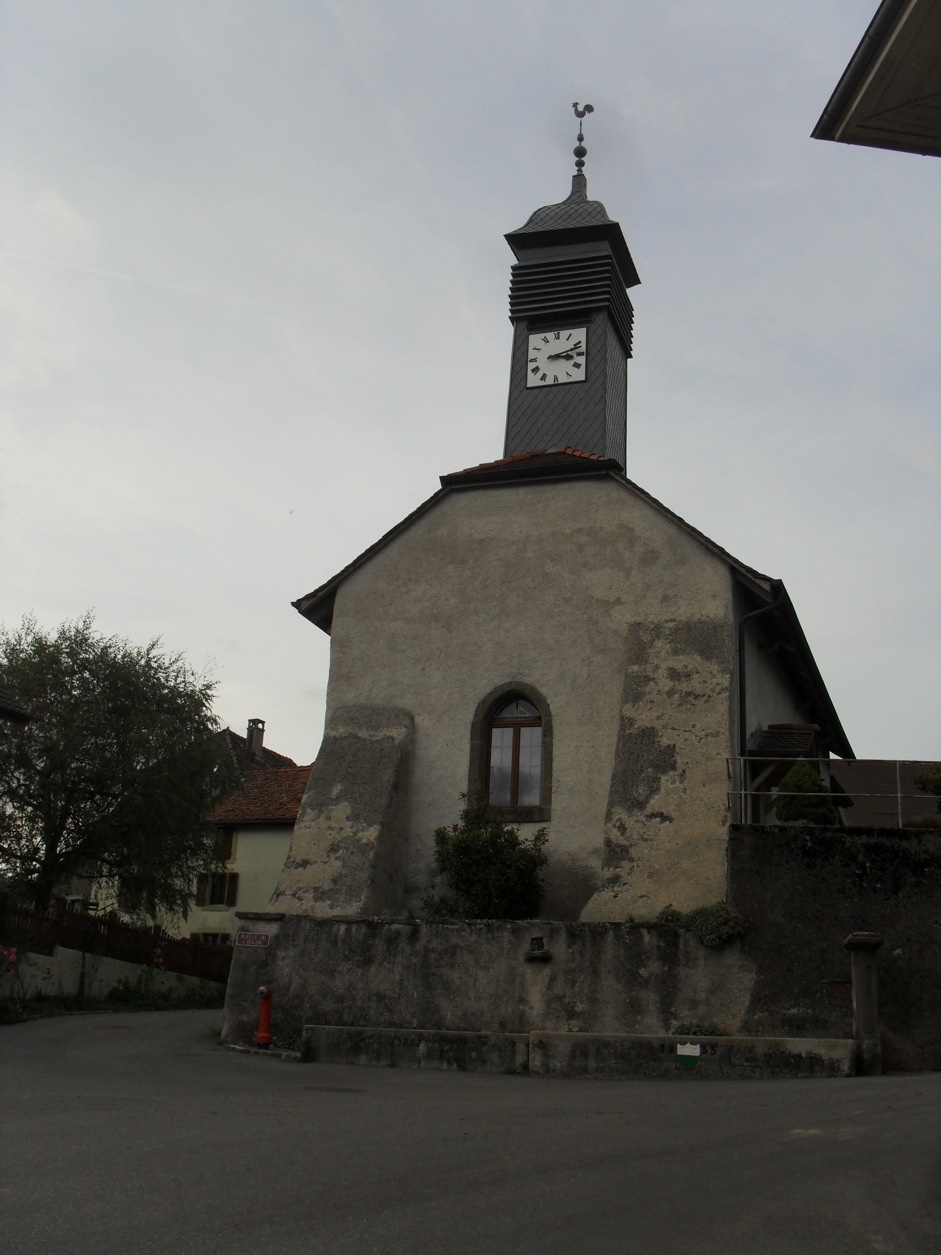 Eglise de Chavannes-sur-Moudon